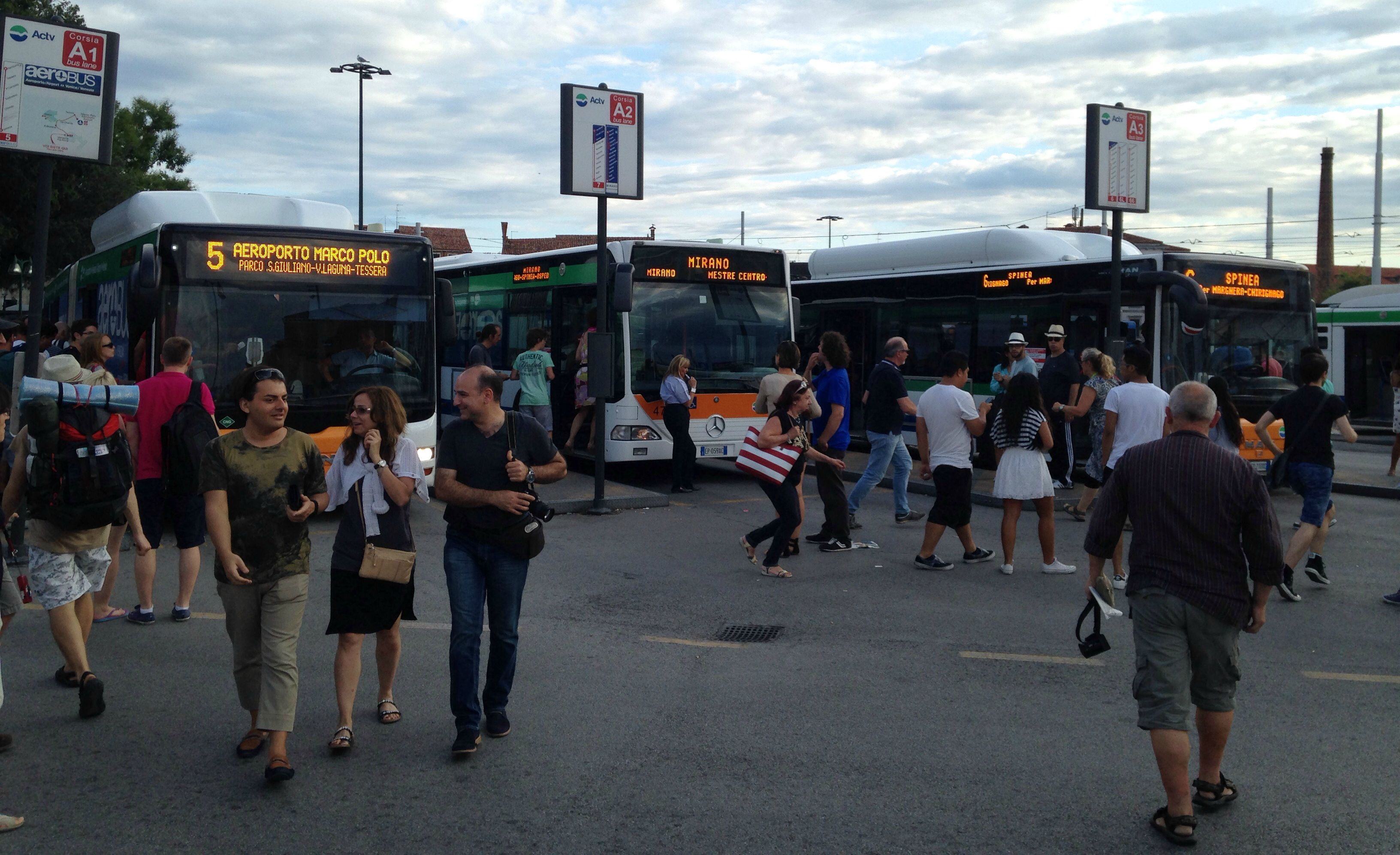 Autobus ACTV in Piazzale Roma a Venezia: -MAN Lion's City G CNG urbano per Aeroporto Marco Polo, Linea 5; -Mercedes Benz Citaro extraurbano per Mirano; -MAN Lion's City G CNG urbano per Spinea, Linea 6